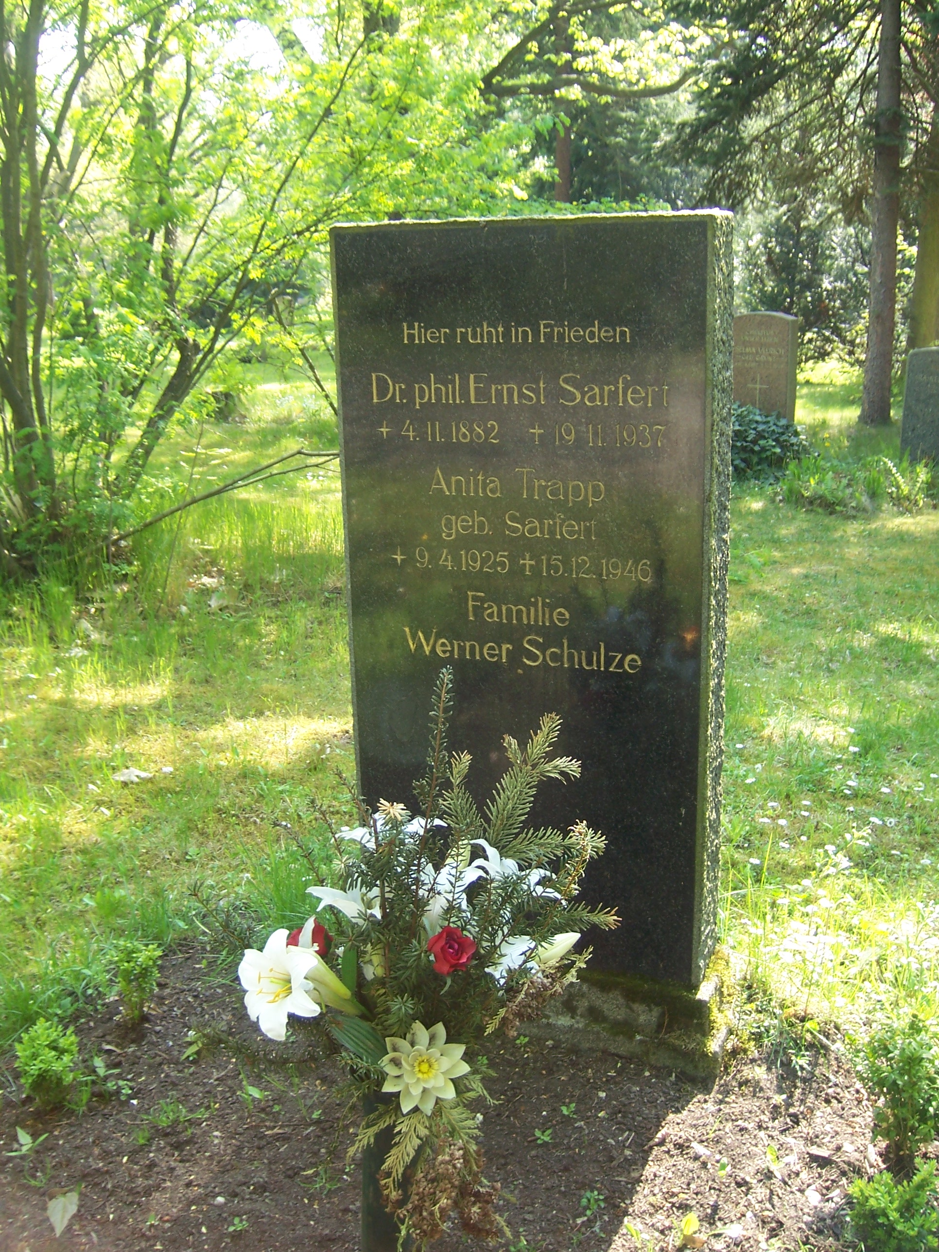 Grabstätte Ernst Sarfert und Angehörige auf dem Südfriedhof in Leipzig